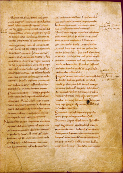 Serments de Strasbourg, 842. Serments, prononcés à Strasbourg le 14 février 842, par lesquels ils se reconnaissent des territoires : la partie francophone pour Charles, le domaine germanophone pour Louis. Comme c'est la langue qui détermine le partage, et pour être compris de tous, les rois prêtent serment en langue vulgaire : le roman pour Charles, le tudesque (germain) pour Louis. Entre ces deux ensembles linguistiques, une longue bande de terre s'étirant du Nord au Sud est dévolue à Lothaire qui lui laissera son nom, la Lorraine, et deviendra à la fin du Moyen Âge le puissant duché de Bourgogne. Ce partage en trois parts à peu près équivalentes est entériné par le traité de Verdun en 843.